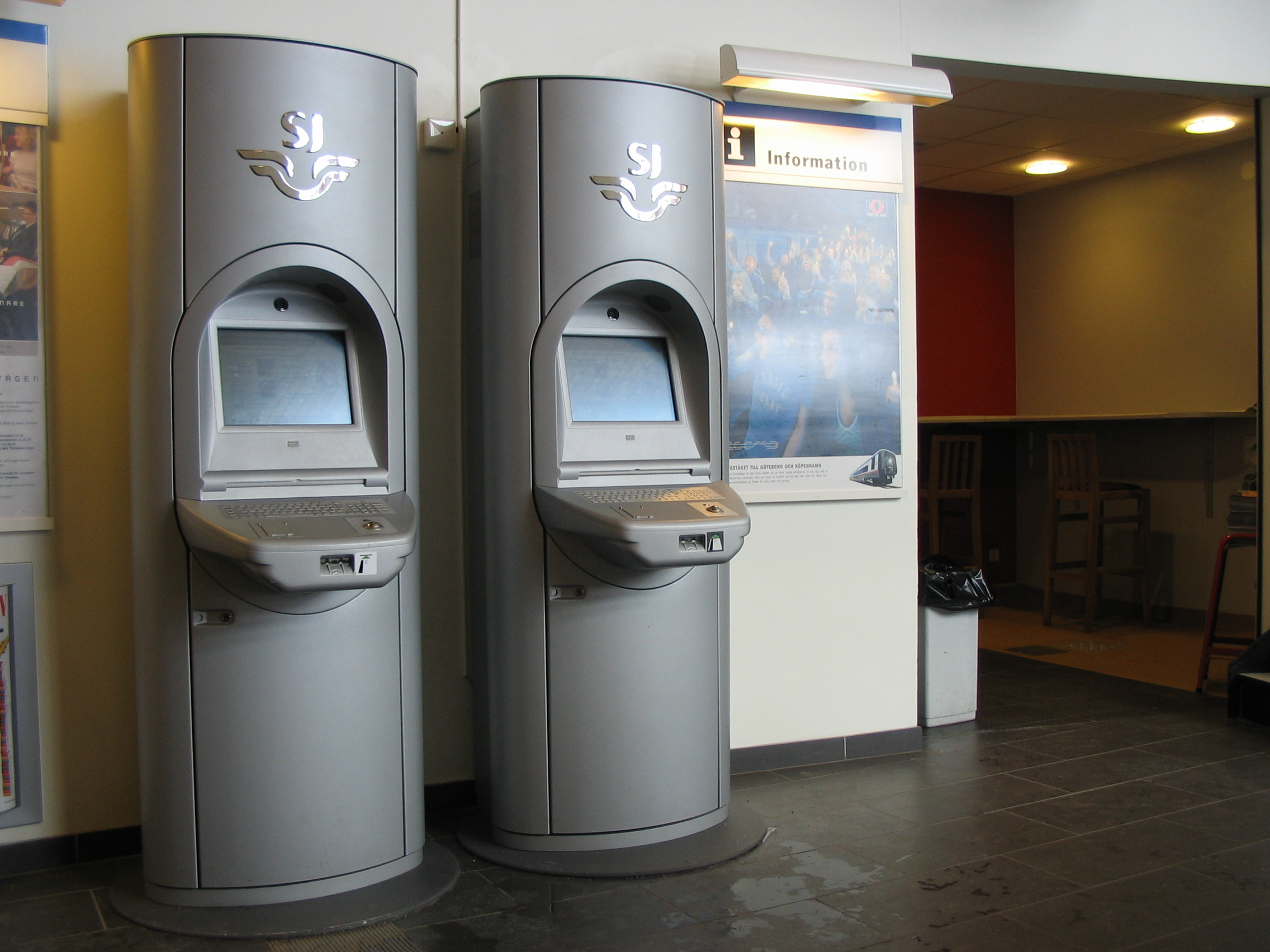 Ruotsin rautateiden lipunmyyntiautomaatteja.